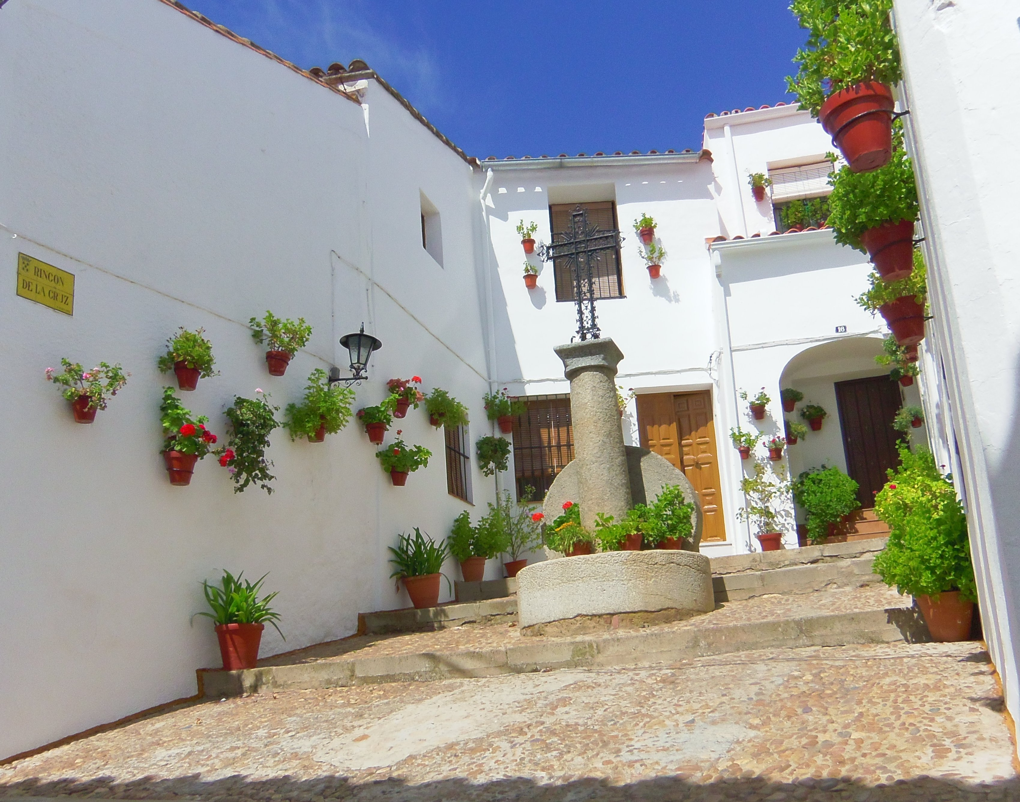 Rincón de la Cruz parte izquierda.